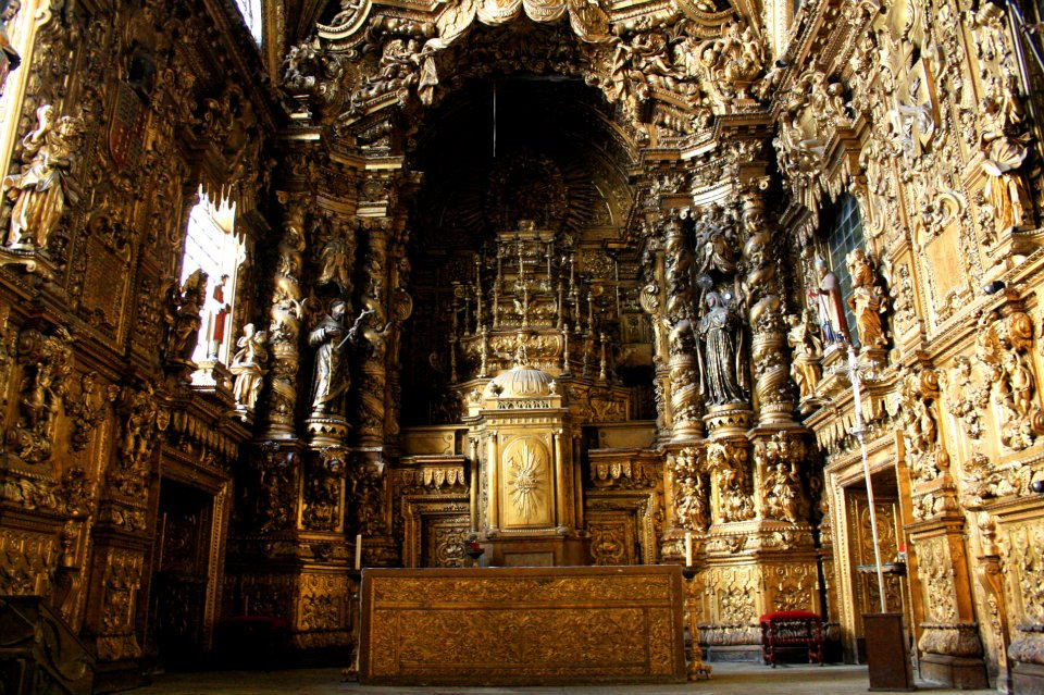 Porto, Portugal